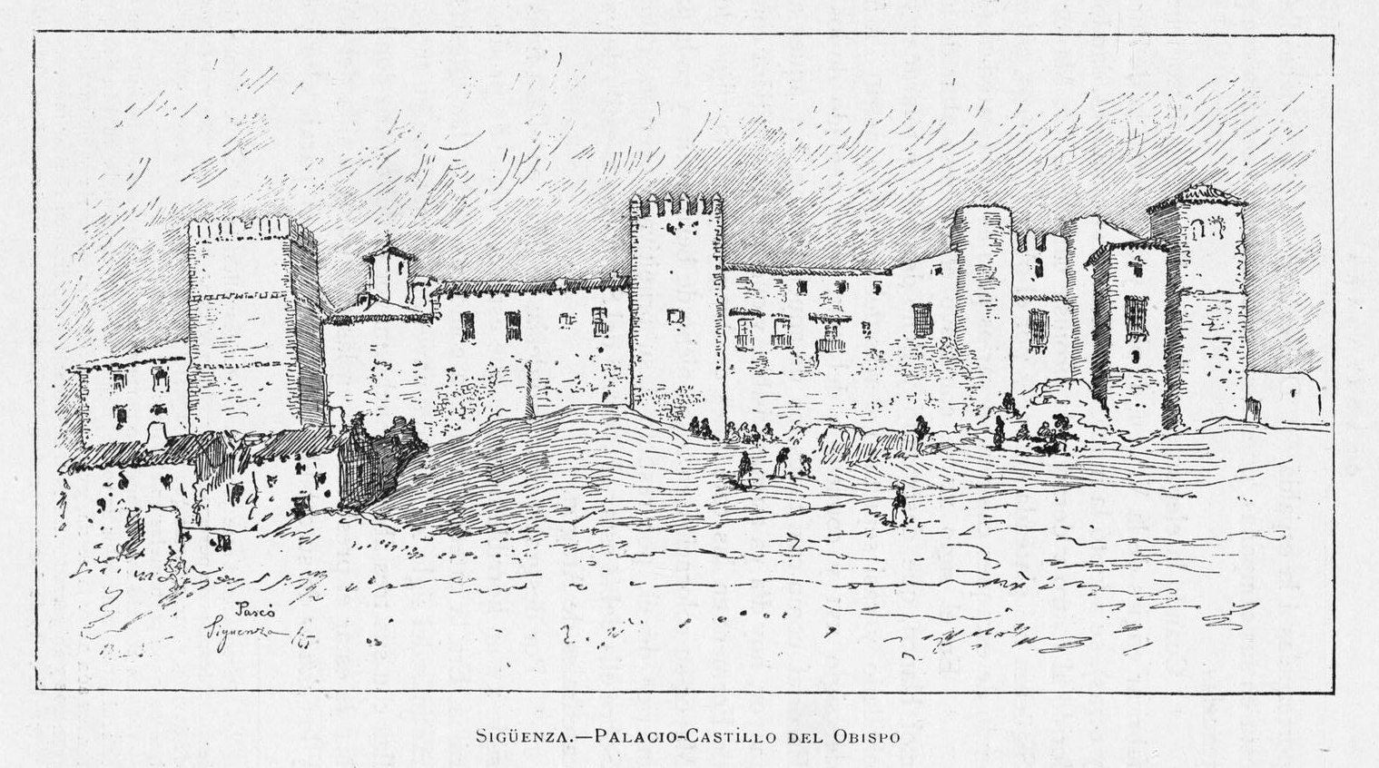 Palacio-castillo del Obispo, en Sigüenza.